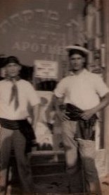 (מימין) אריה גרבנוב (בן 16) וחבר מ"האגודה הימית זבולון" במדים ראשונים (אסכולה רוסית)